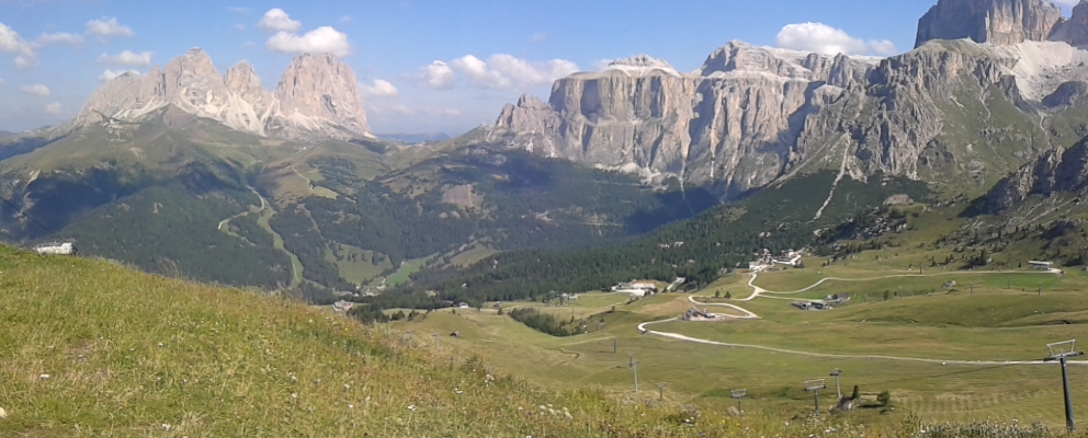 Gruppo del Sella nel Trentino Alto Adige (Q49963337)